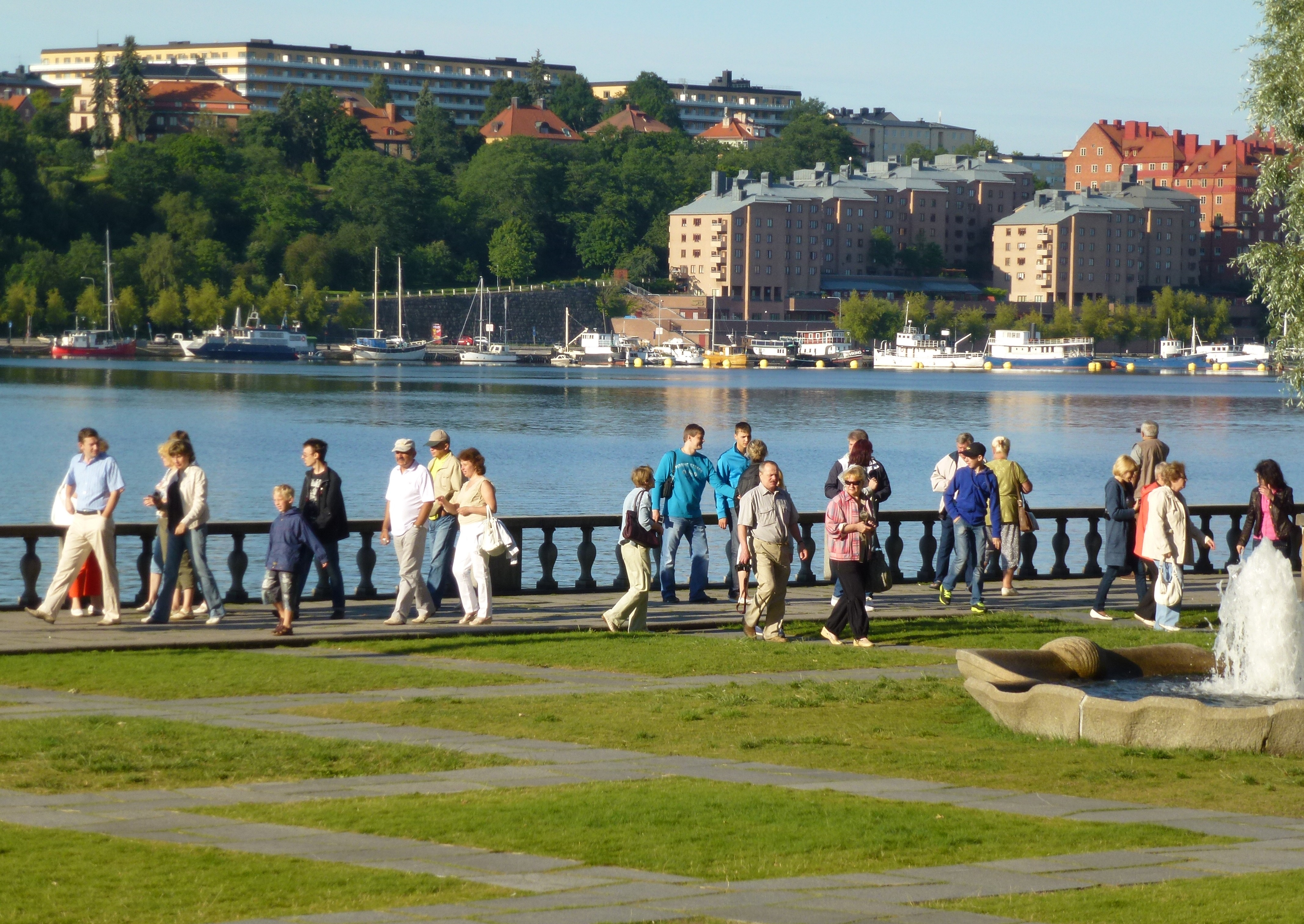 Stadshuset turister